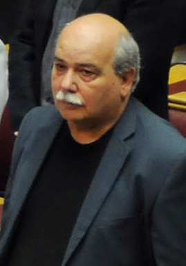 Portrait de l'homme politique grec Níkos Voútsis.